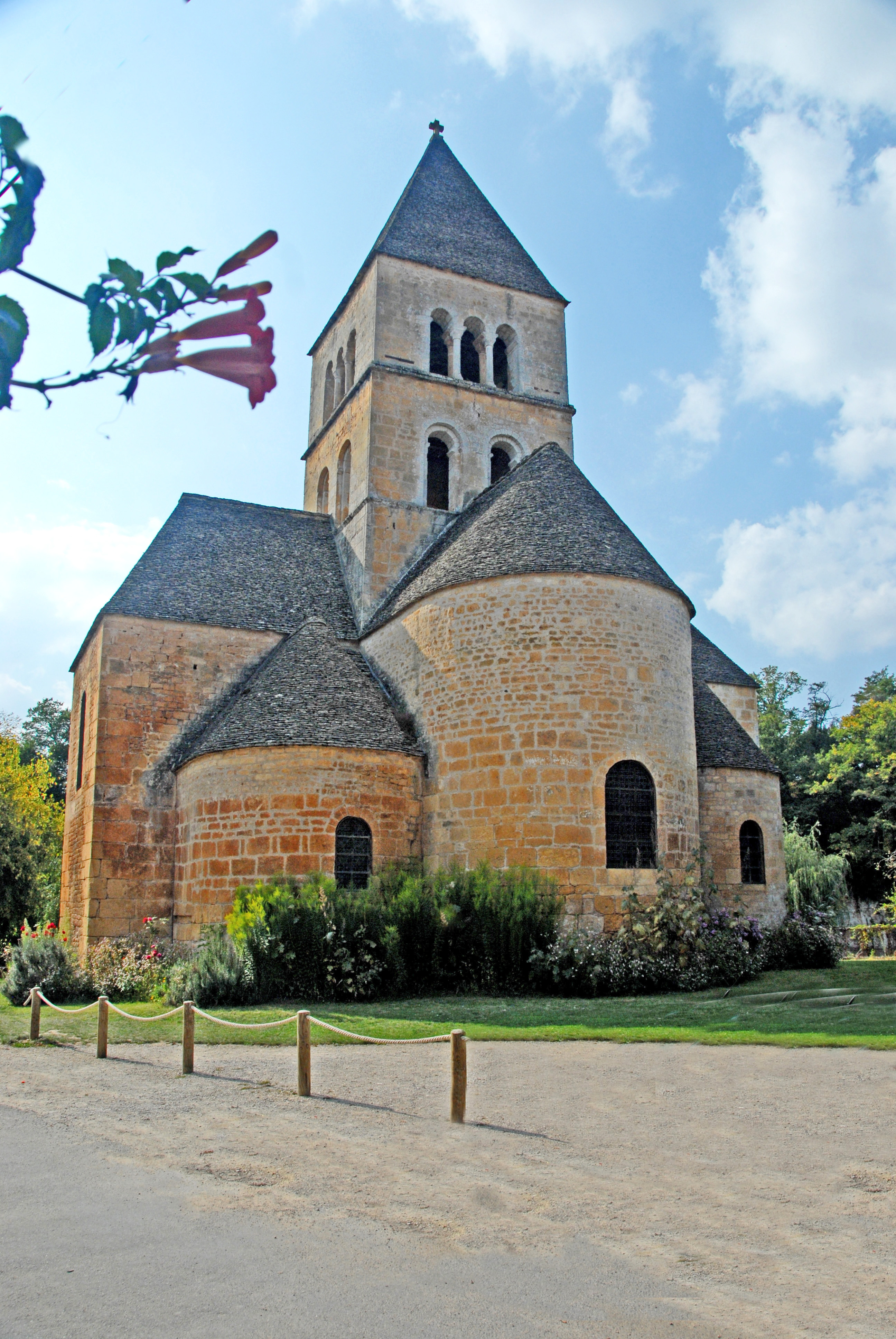 St-Léon-sur-Vesère, Chorhaupt von SO